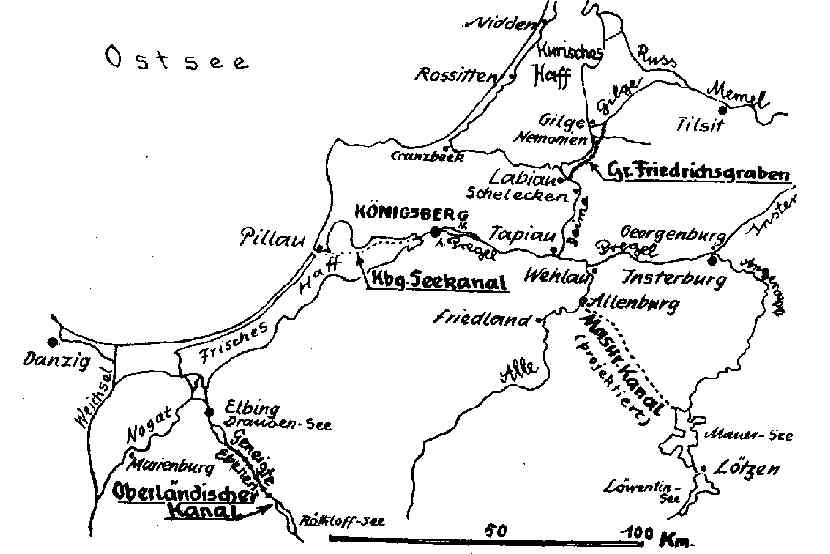 Projektkarte des Masurischen Kanals, vor 1911